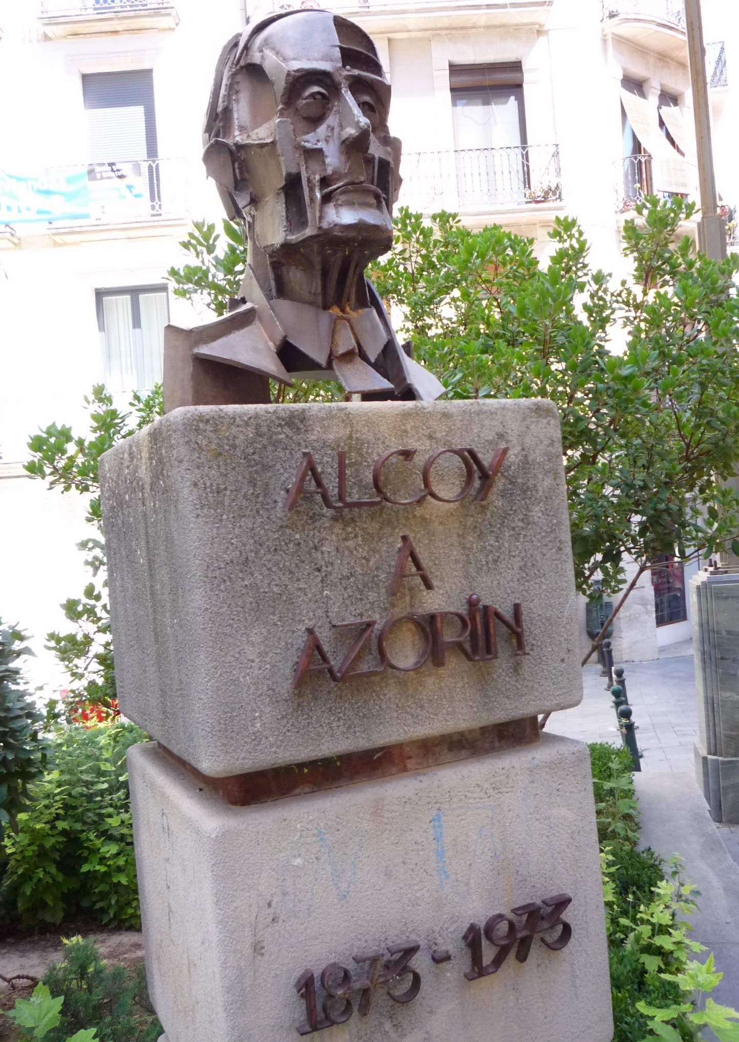 Alcoy - Monumento a Azorín